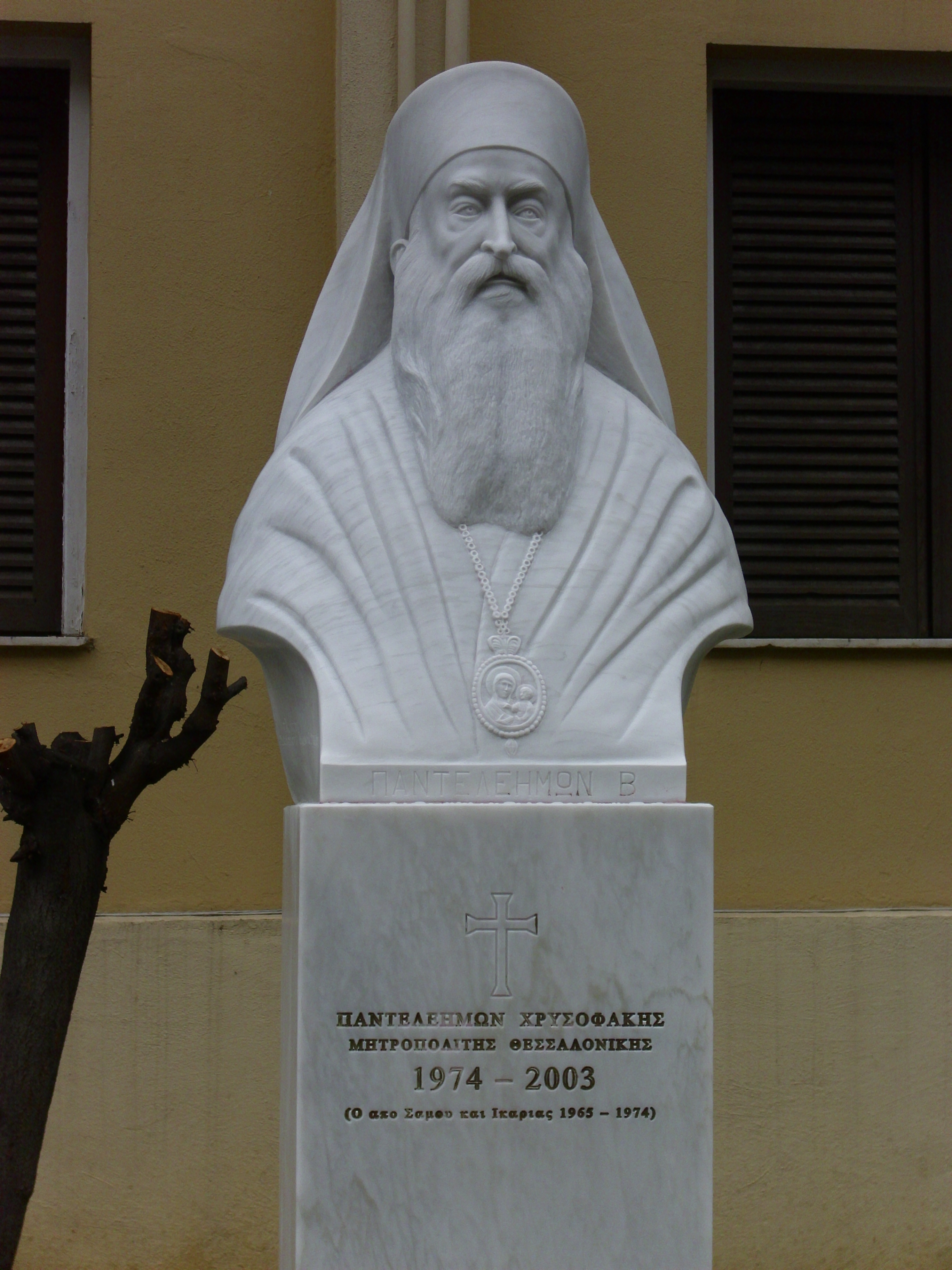 Статуя на солунския митрополит Пантелеймон Хрисофакис в Солун.